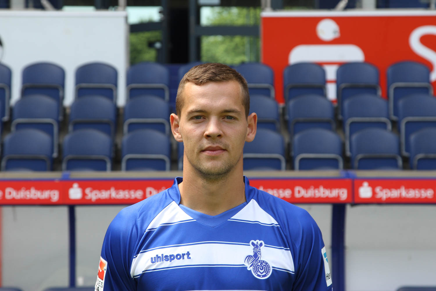 Stanislav Iljutcenko 2015